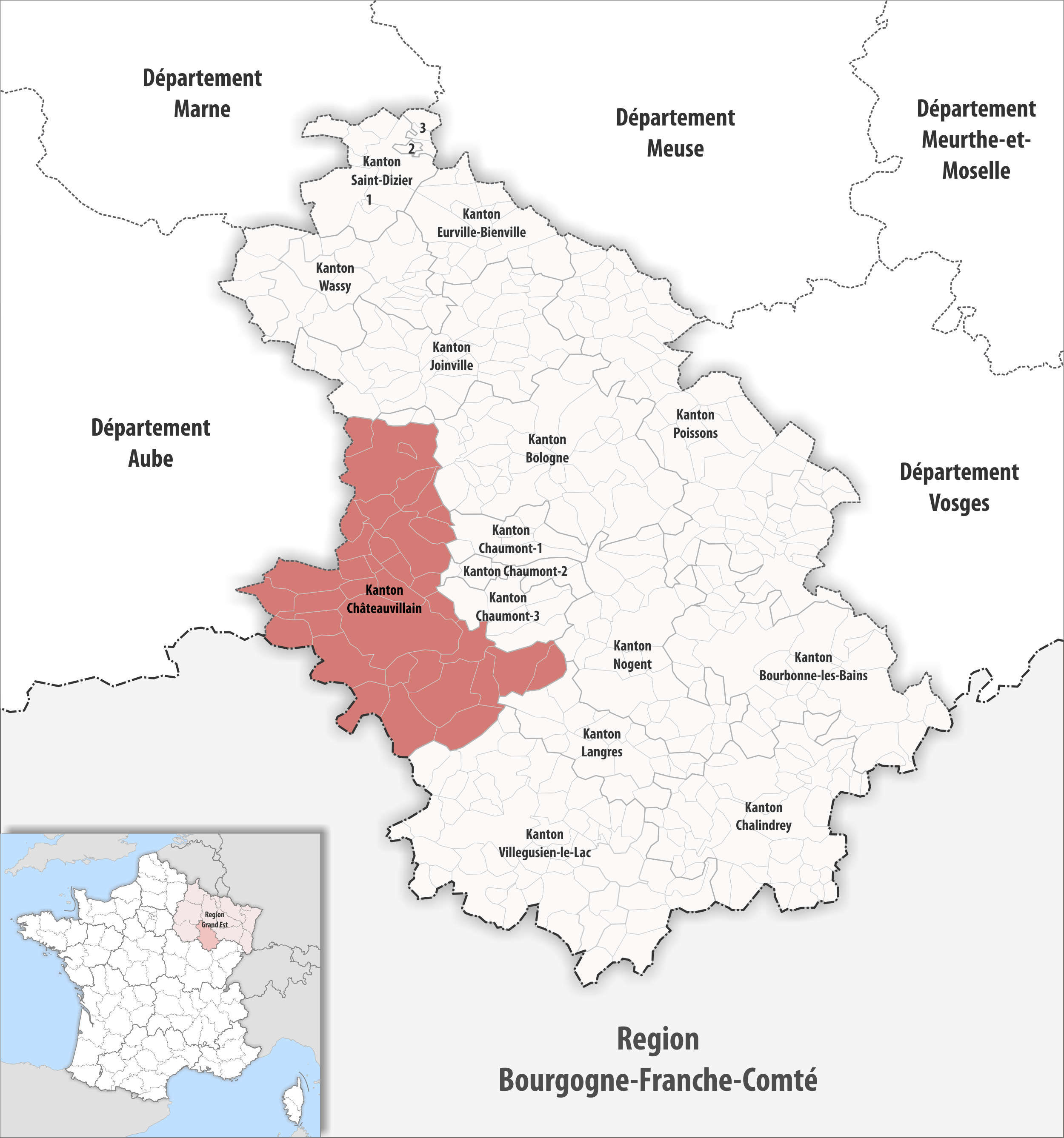 Lage des Kantons Châteauvillain